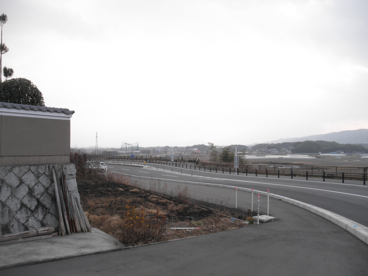 奈良県大和郡山市城町 奈良県道249号大和郡山環状線